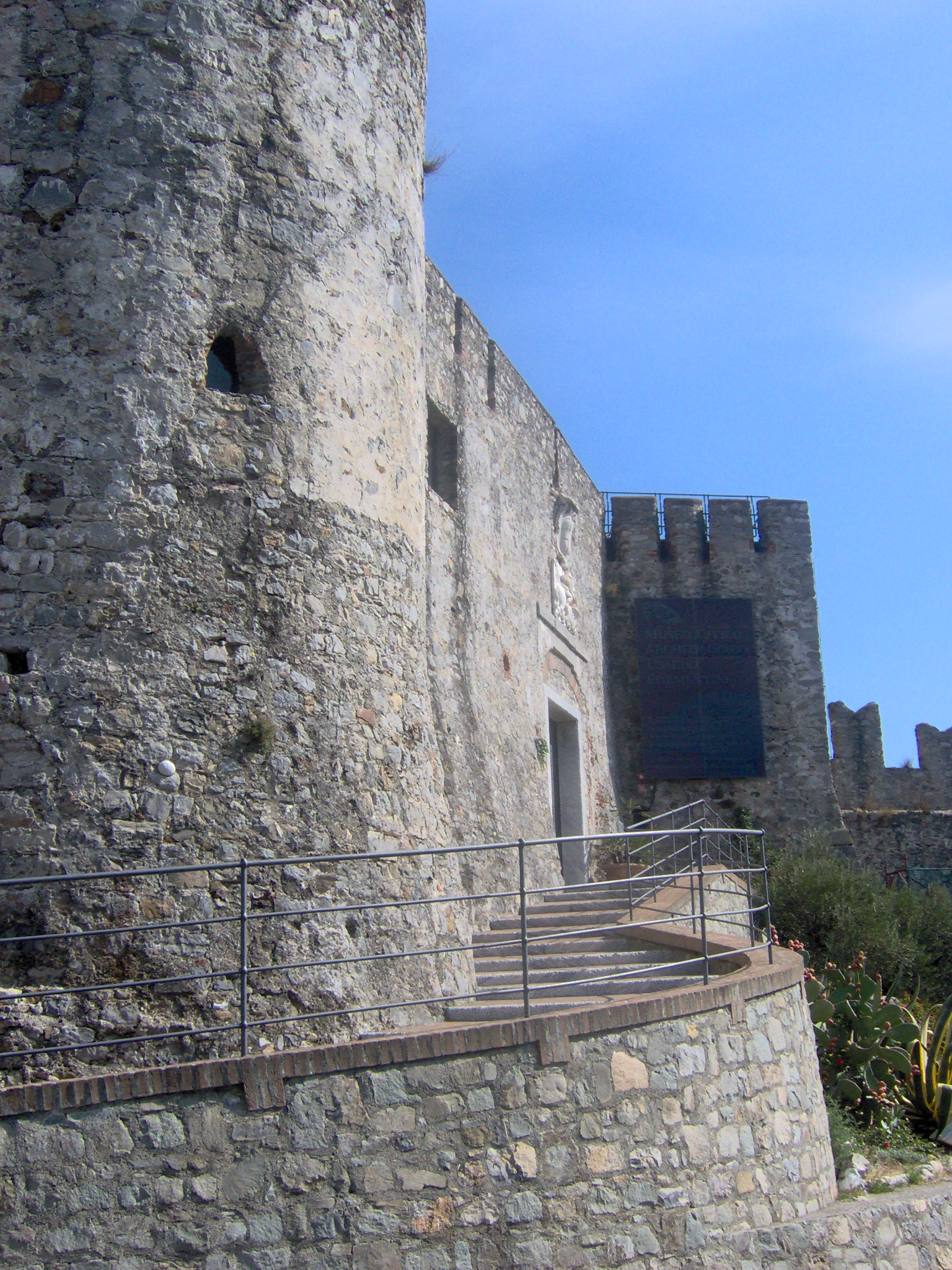 La Spezia - hrad